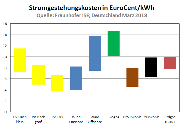 Stromgestehungskosten für erneuerbare Energien und konventionelle Kraftwerke in Deutschland (Datenquelle: Fraunhofer, ISE; März 2018)